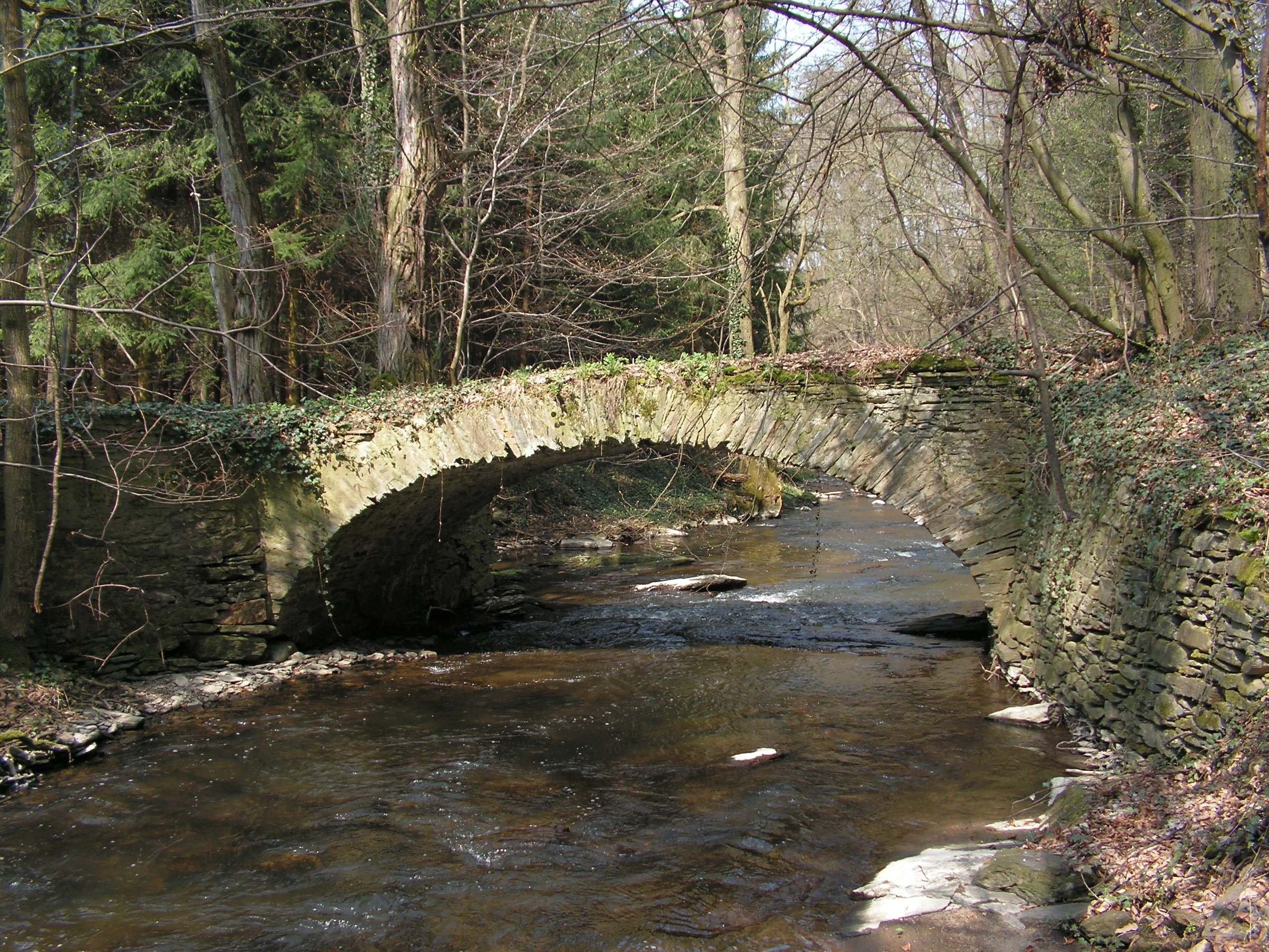 Starobylý kamenný most přes Jánský potok (Klejnárka), u Jánského mlýna, nedaleko Hraběšína.